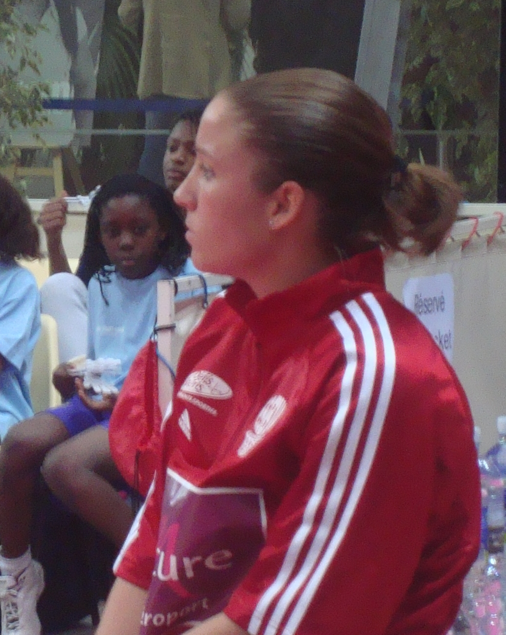 Le meneuse belge Marjorie Carpréaux